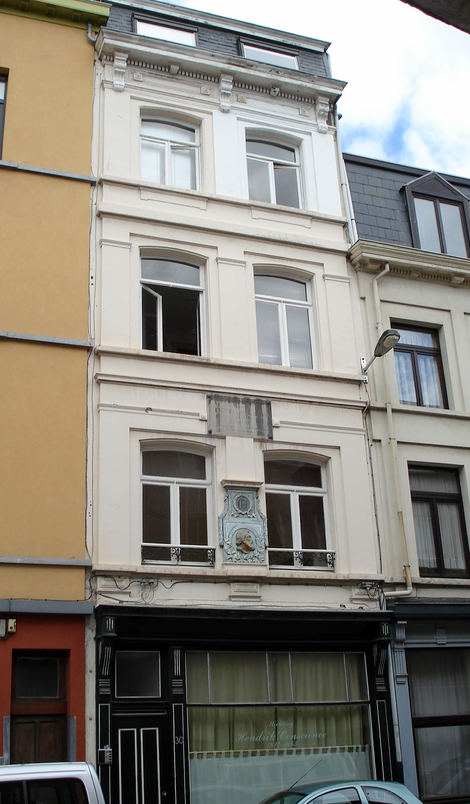 Geboortehuis Hendrik Conscience, Pompstraat, Antwerpen